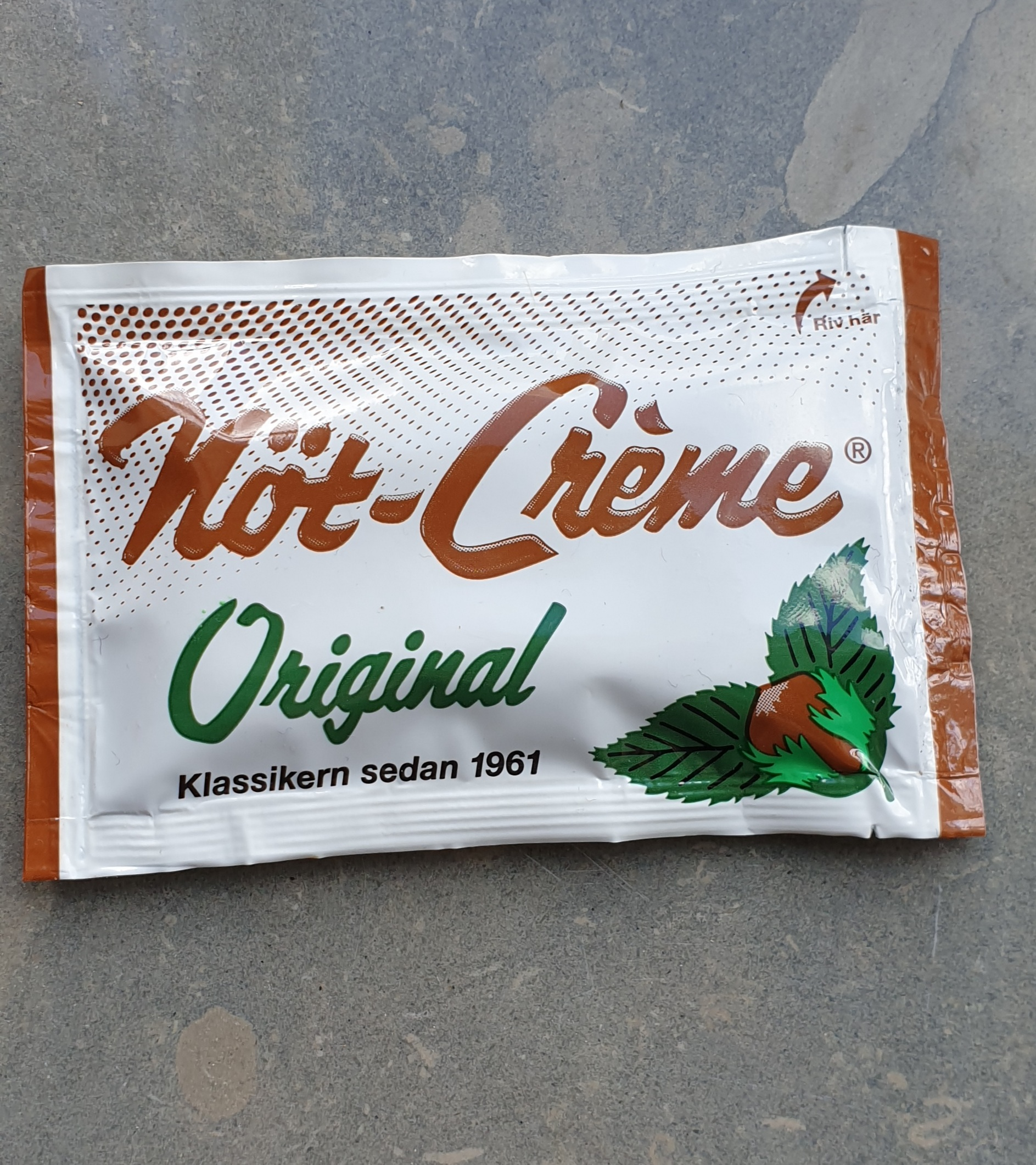 En bild på Nöt-Créme i påse.